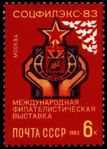 Почтовая марка СССР, посвящённая Международной филателистической выставке "Соцфилэкс-83", проходившей в Москве